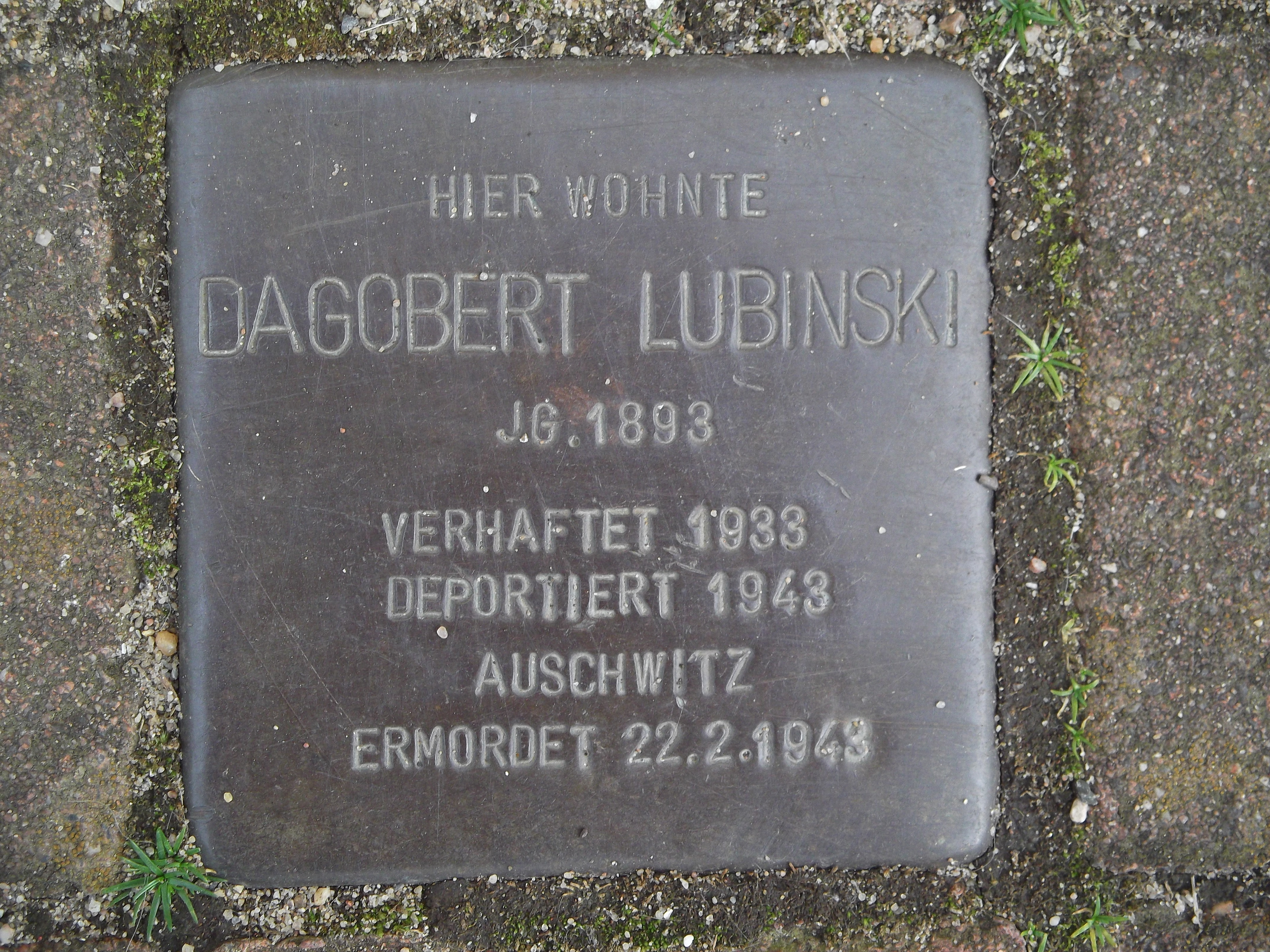 Hier wohnte Dagobert Lubinski, Jg. 1893, verhaftet 1933, deportiert 1943 Auschwitz, ermordet 22.2.1943